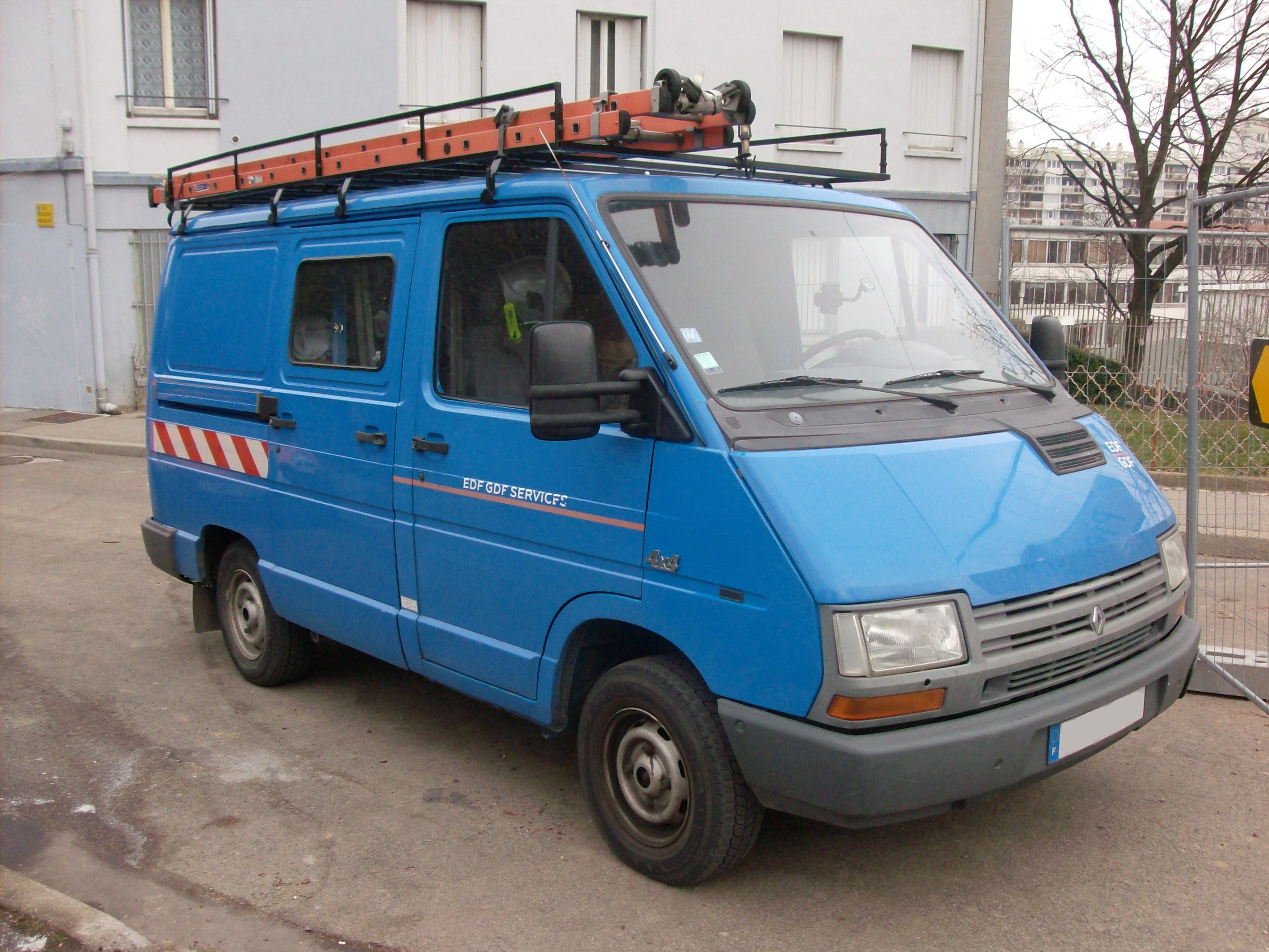 Renault Trafic 4x4 EDF-GDF Fourgonnette